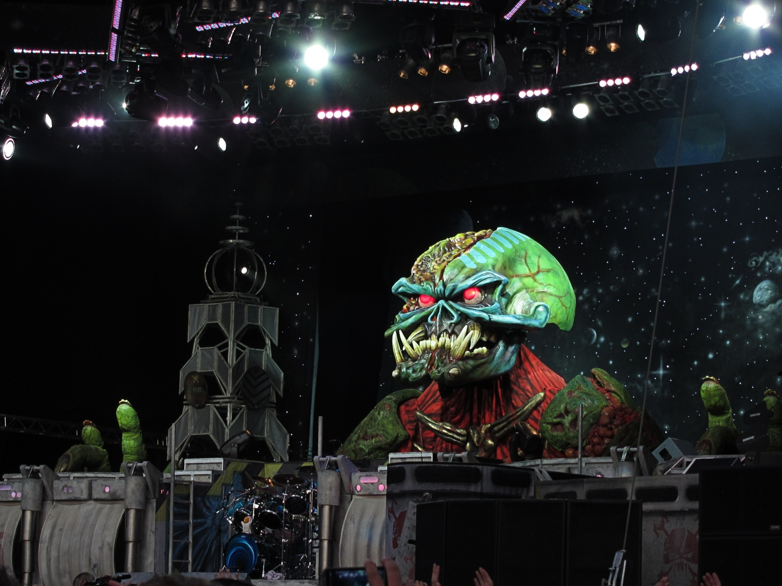 Escenario de la actuación de Iron Maiden en Helsinki durante el" Final Frontier World Tour 2011" en el Olympic Stadium.